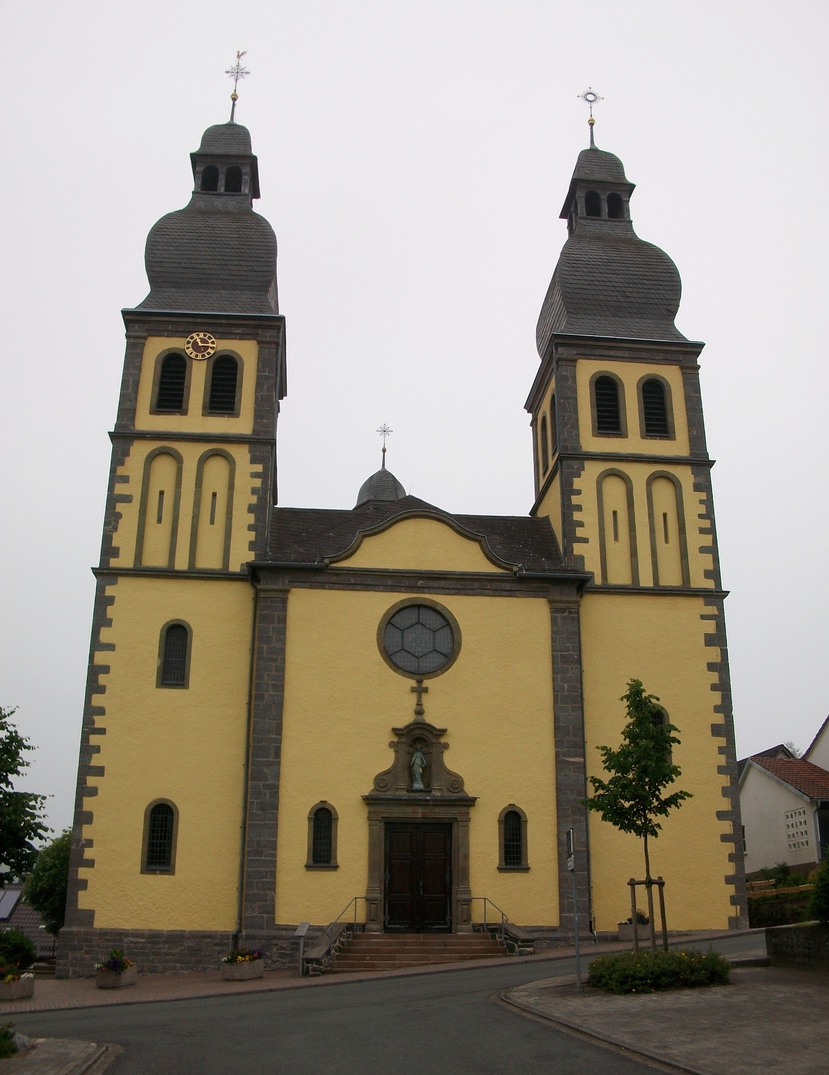 Eingang St. Maria Magdalena, denkmalgeschützte Kirche in Marsberg-Padberg (Germany)